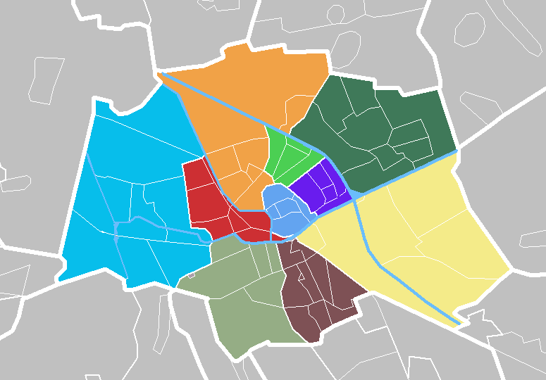 Kaart van de stad Groningen met de 10 wijken